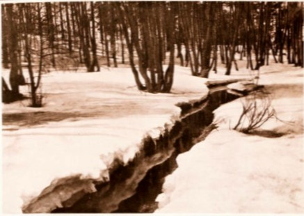 Струмок узимку. І.А. Тімірязєв